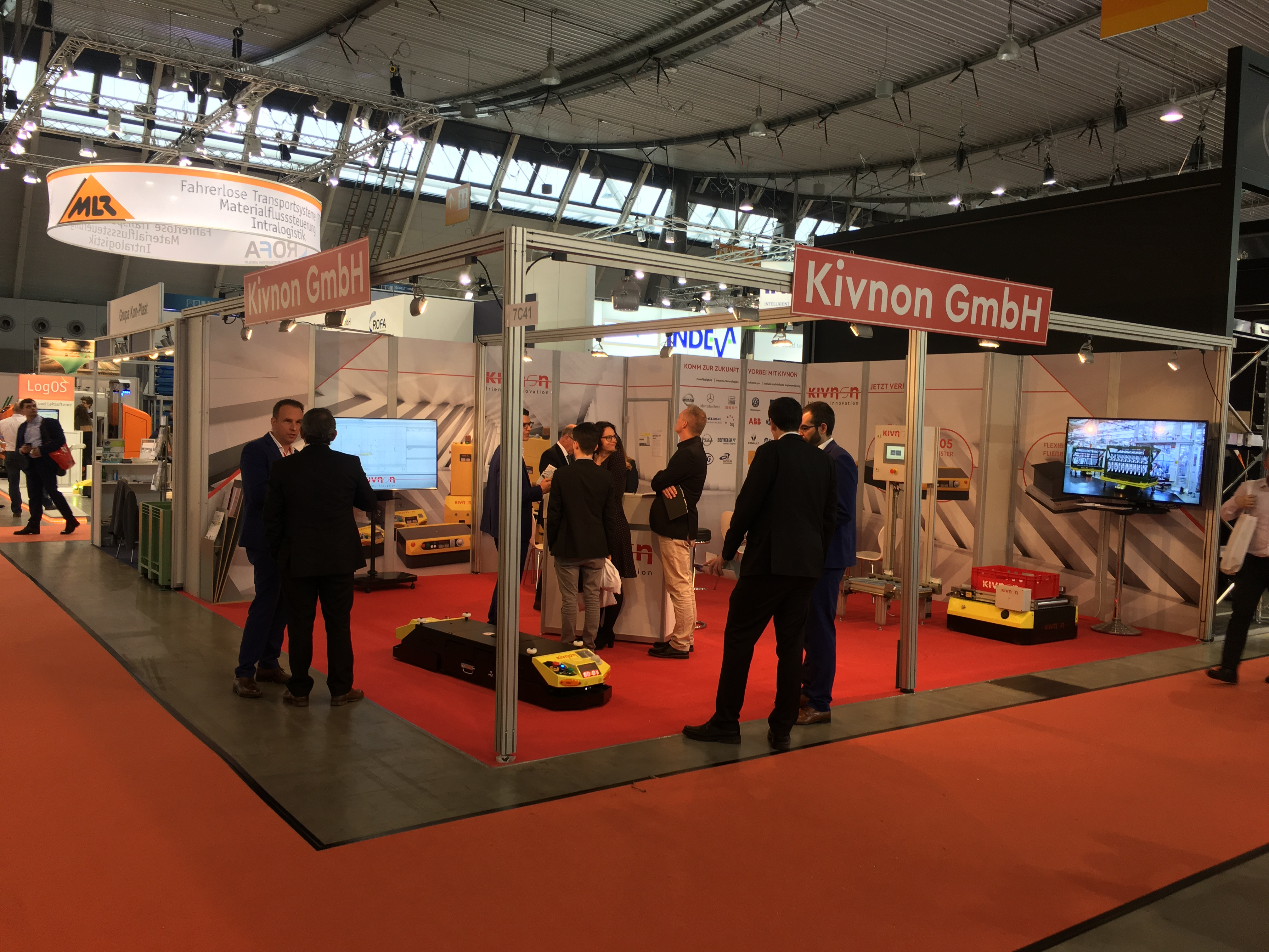 Kivnon stellt seine FTFs in LogiMAT aus.